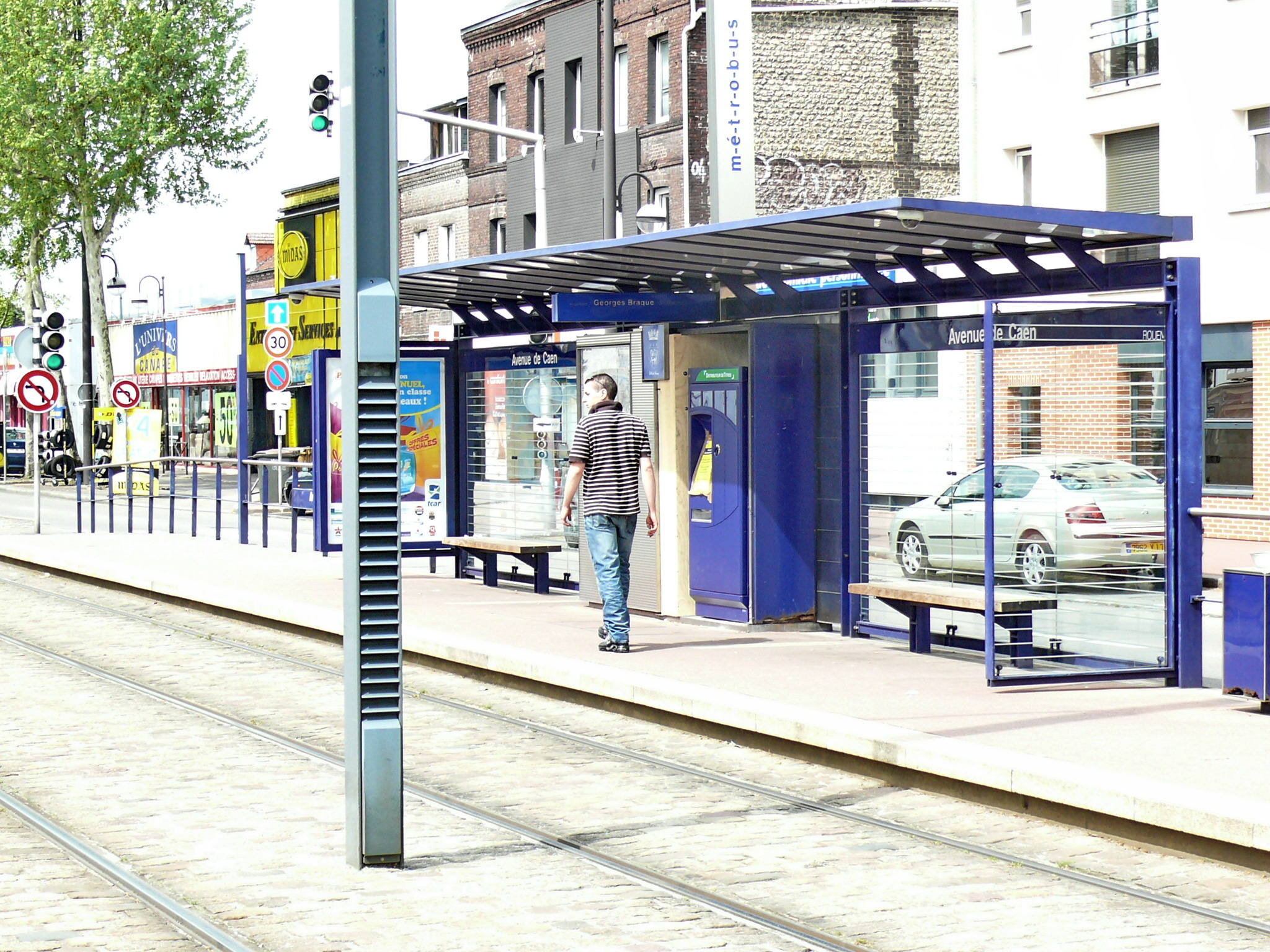 Mobilier urbain du tramway de Rouen (M-e-t-r-o-b-u-s) conçu par Jean-Michel Wilmotte